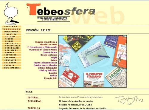 Portada del primer número de la primera época de la revista web Tebeosfera (2001).